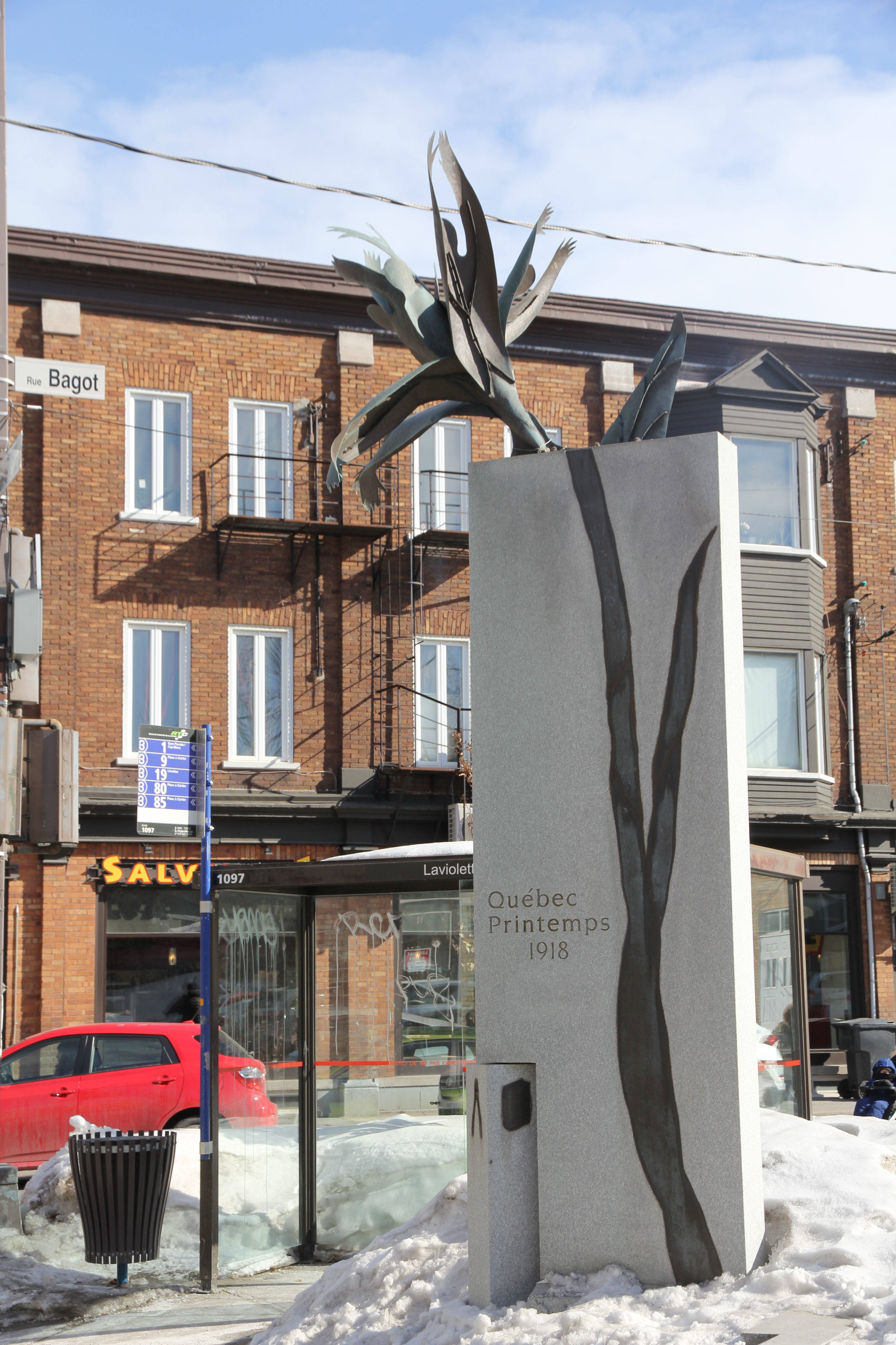 Monument Québec, printemps 2018 de la sculptrice Aline Martineau, à l’angle des rues Saint-Joseph et Bagot, pour commémorer les émeutes de la conscription à Québec (28 mars-1er avril 1918)